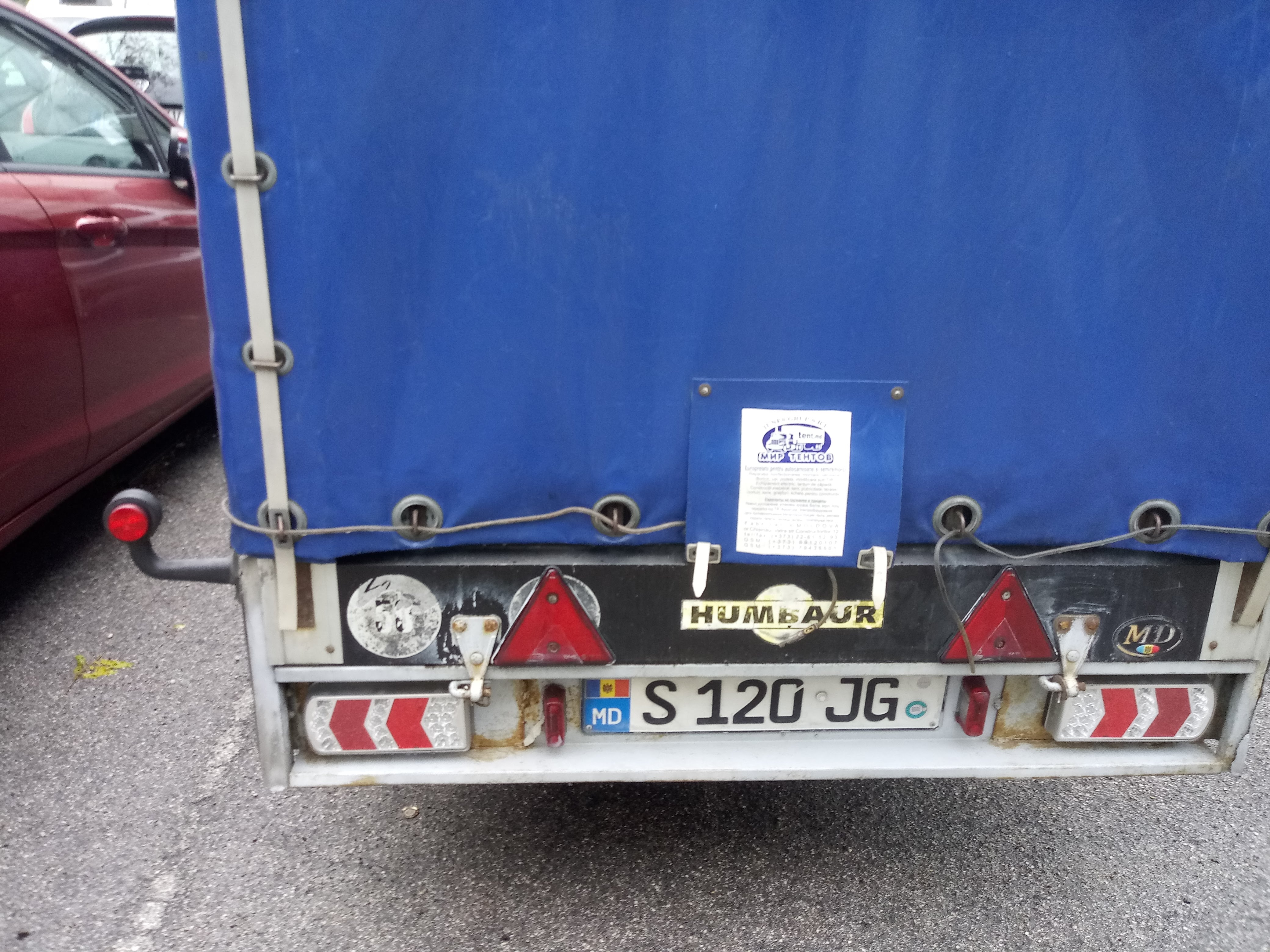 La foto rappresenta la targa su una riga, con formato in uso dal 2015, di un carrello appendice moldavo. E' stata scattata il 6 settembre 2019 in un parcheggio di via Longhin - Padova